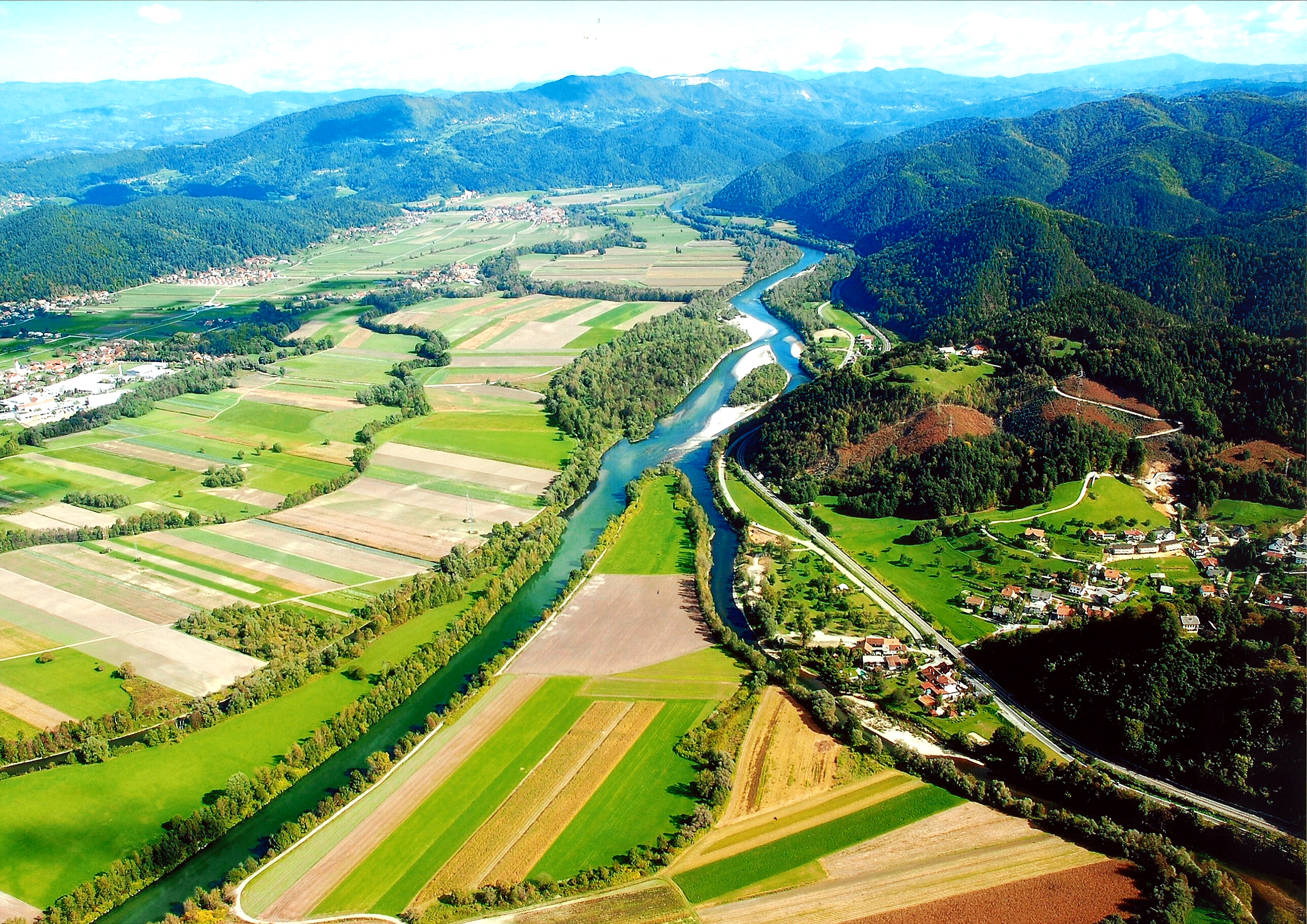 Pogled na Podgrad pri Ljubljani, sotočje rek Save, Ljubljanice in Kamniške Bistrice.